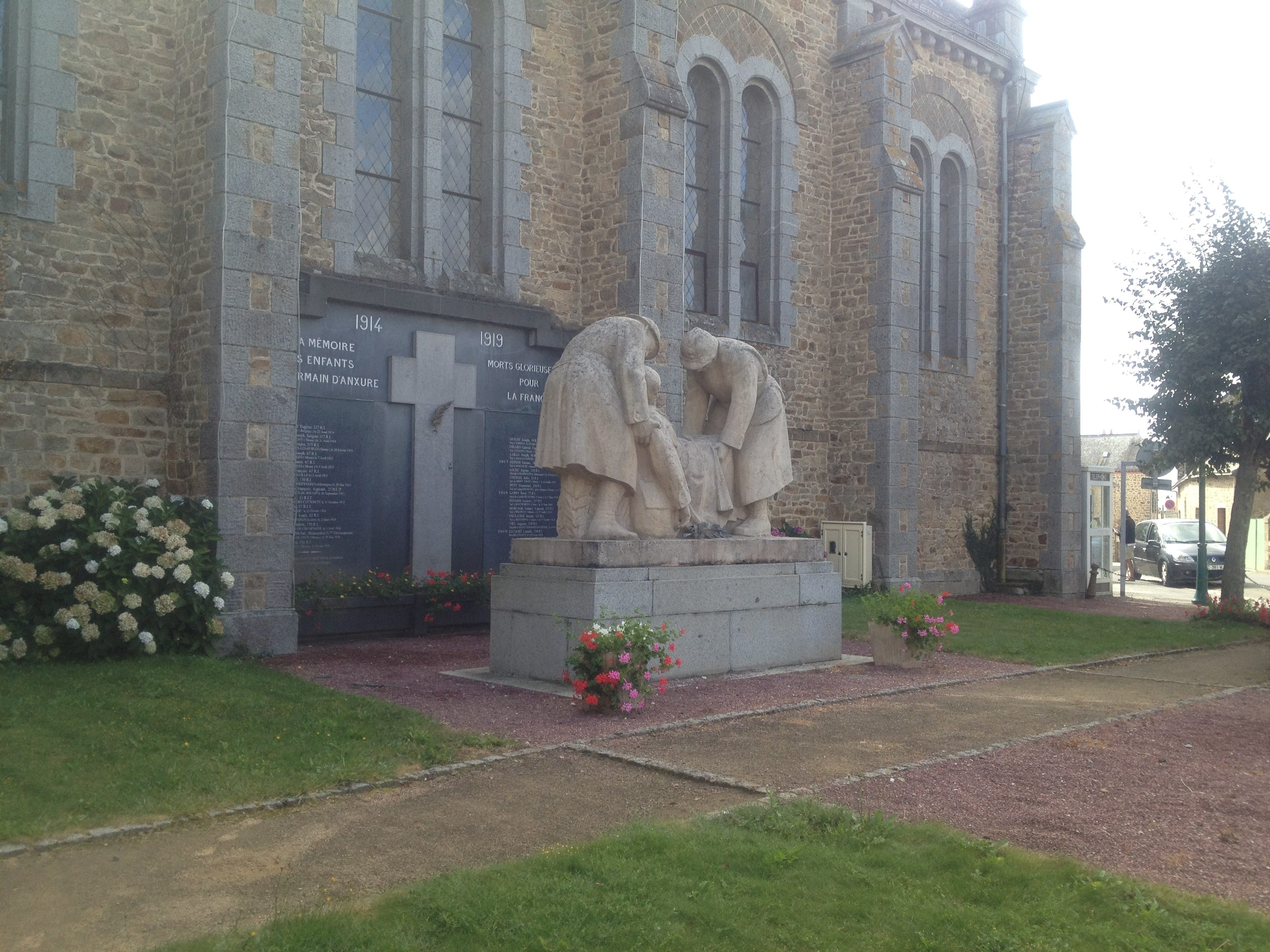 Monument aux morts de St Germain d'Anxure (Mayenne, France)